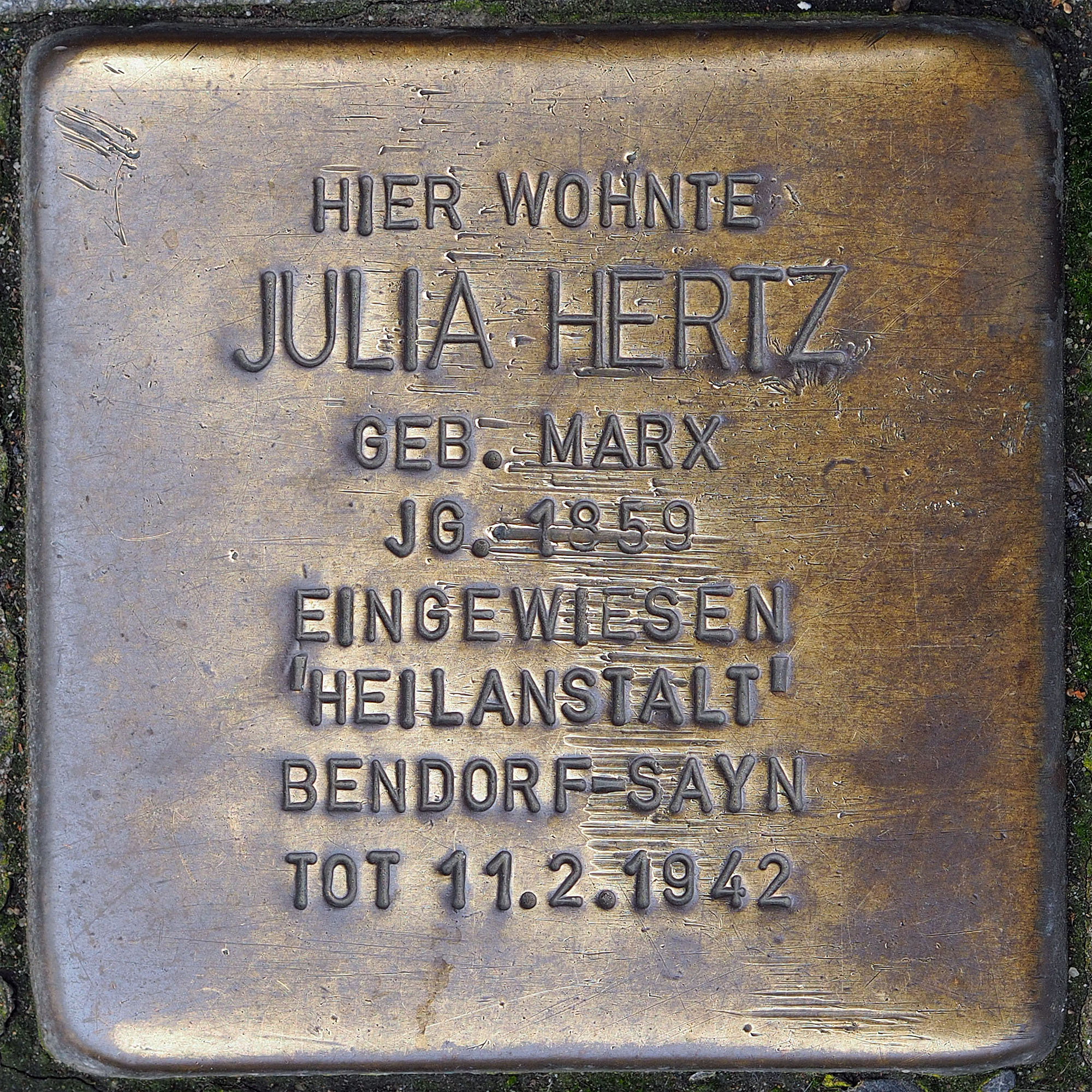 Stolpersteine GV: Hertz, Julia